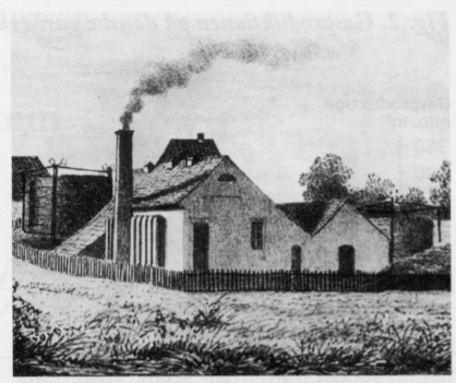 Danmarks første offentlige gasværk åbnet 1953, Sct. Jørgens Gade, Odense